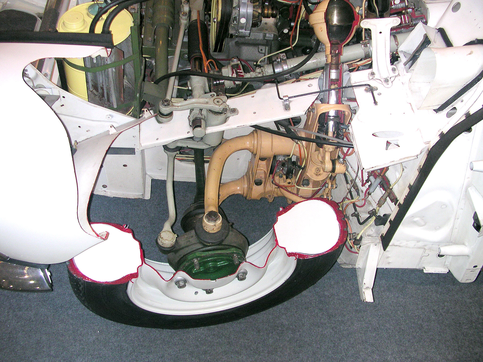 Essen, Technoclassica 2005. Citroën DS Schnittmodell, das etwa 1965 im Auftrag von Citroën-Kommunikationsdirektor Jacques Wolgensinger gebaut wurde